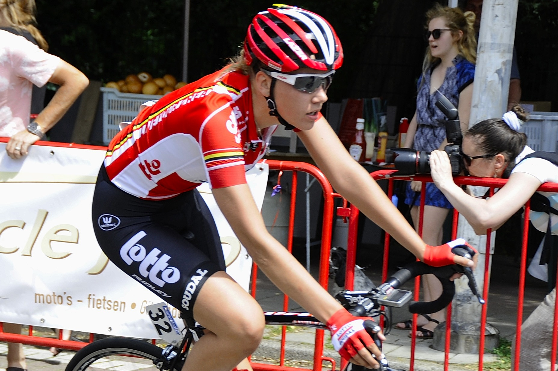 Anouk Rijff bij een wedstrijd in Borgerhout